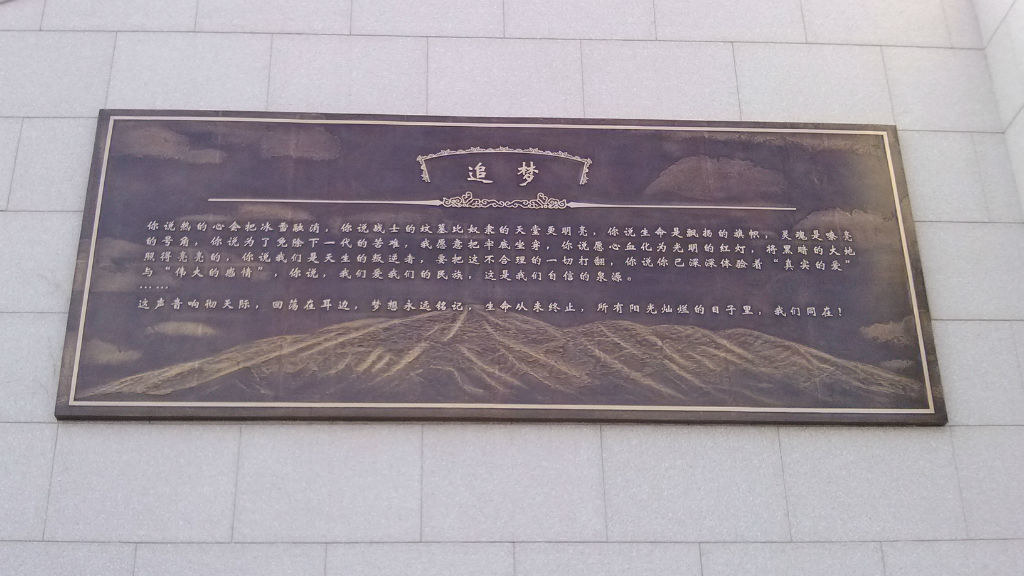 追梦